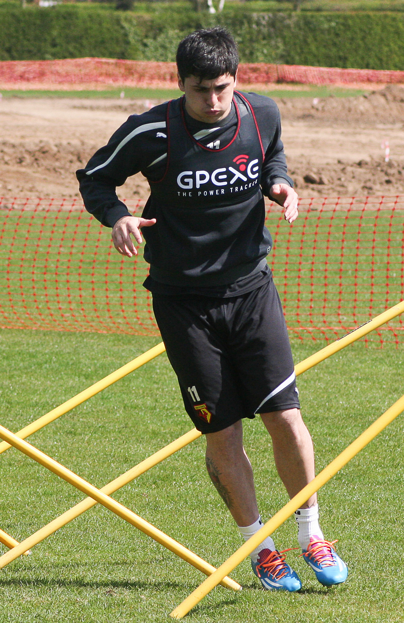 Fernando Forestieri